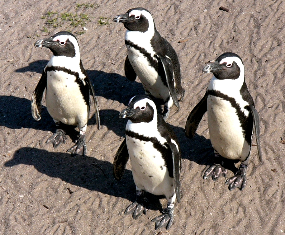 Brillenpinguine am Stony Point in Betty's Bay (August 2010)